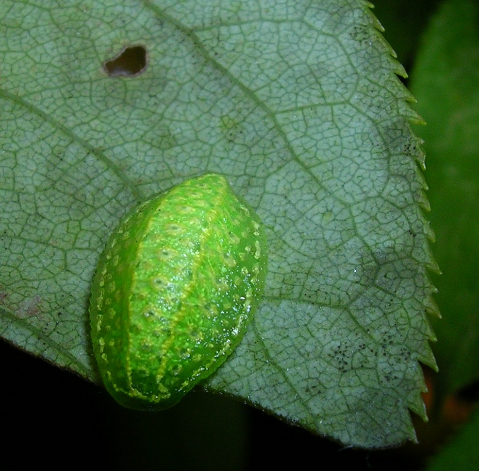 Larva of Lithacodes fasciola, Limacodidae